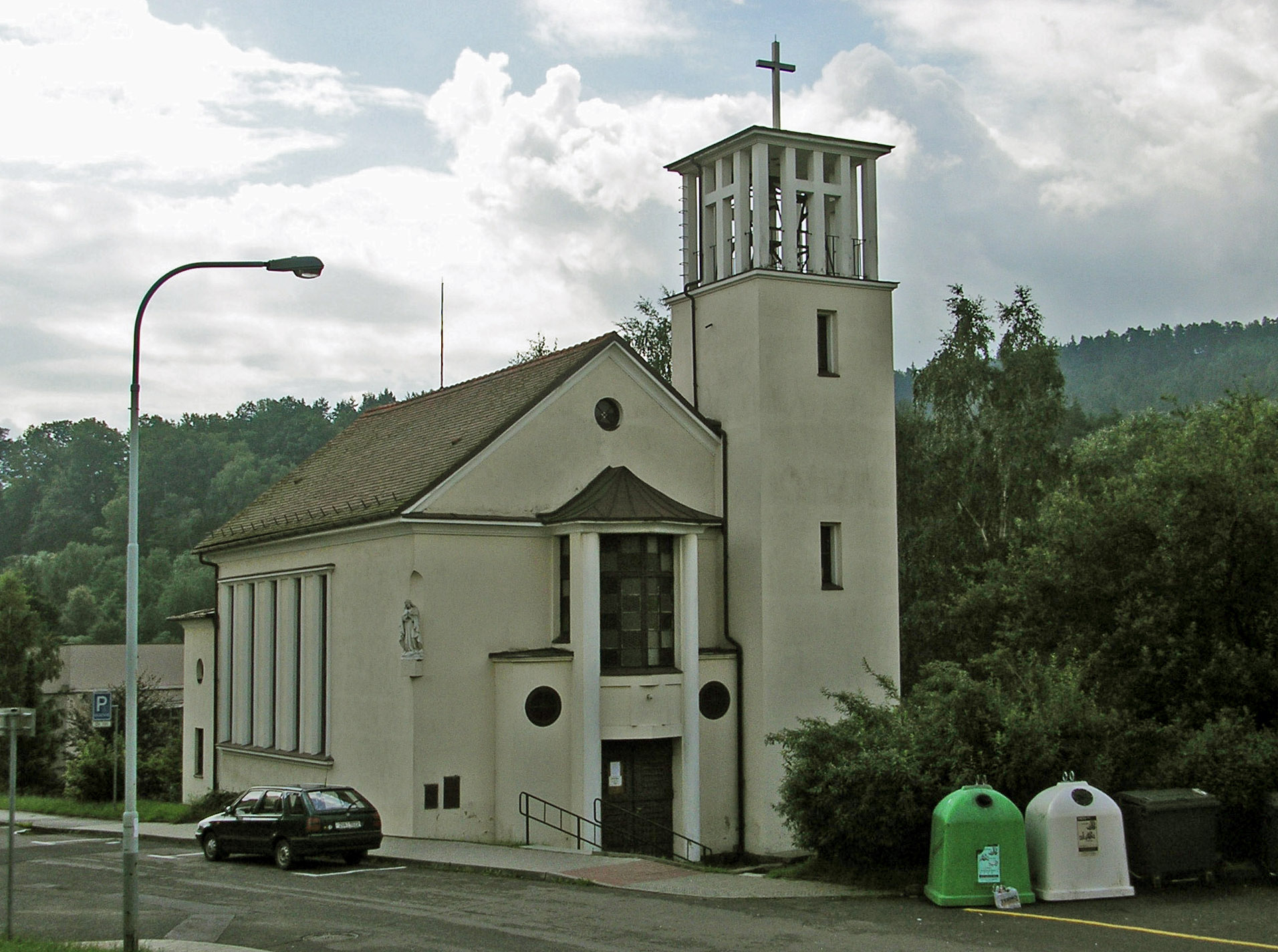 Bynovský katolický kostel v současnosti.